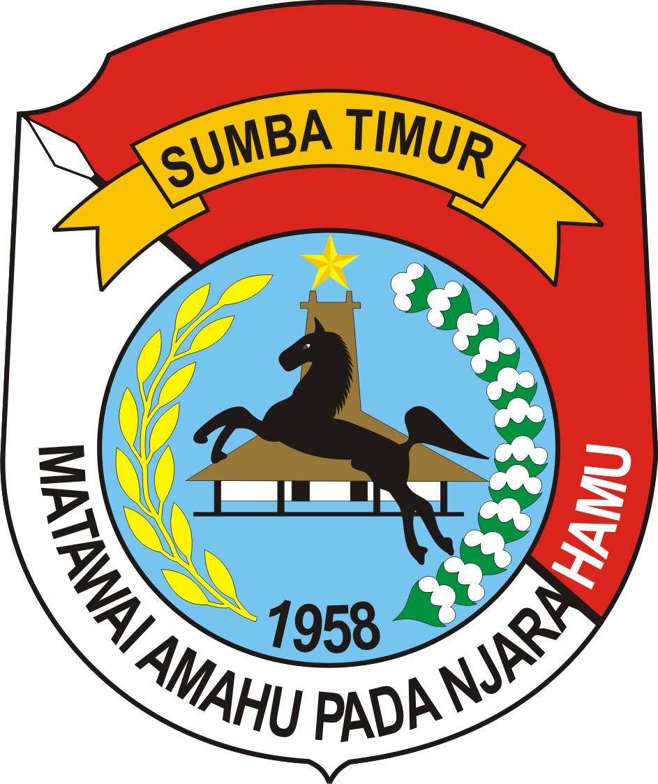 Seal of East Sumba Regency